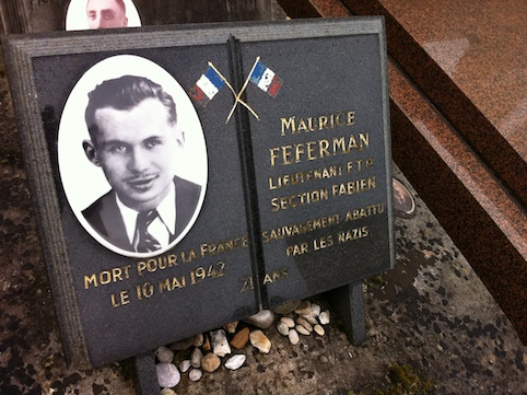 Maurice (Mordka) Feferman, né le 19 décembre 1921 à Varsovie en Pologne et mort le 10 mai 1942 à Paris, est un Résistant juif.